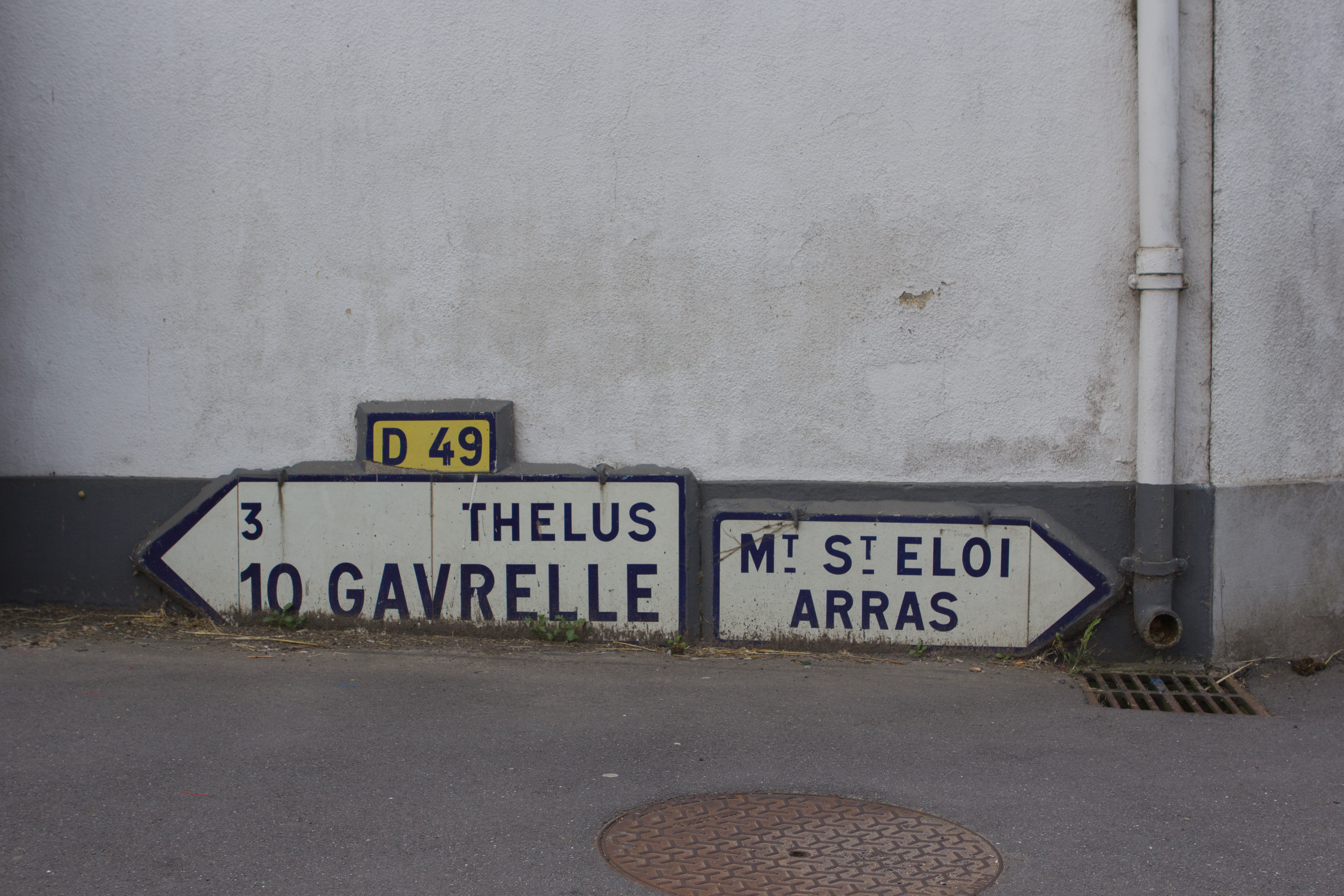 Vue de Neuville-Saint-Vaast / Neuville-Saint-Vaast, Pas-de-Calais, France